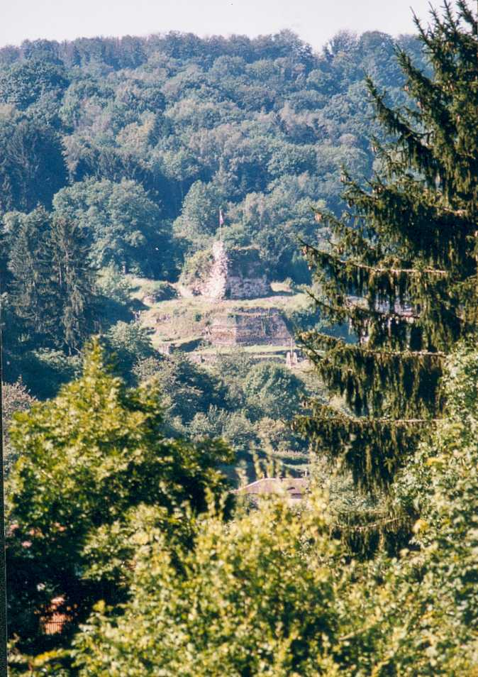 Fontenoy-le-Château, ruine du chateau fort